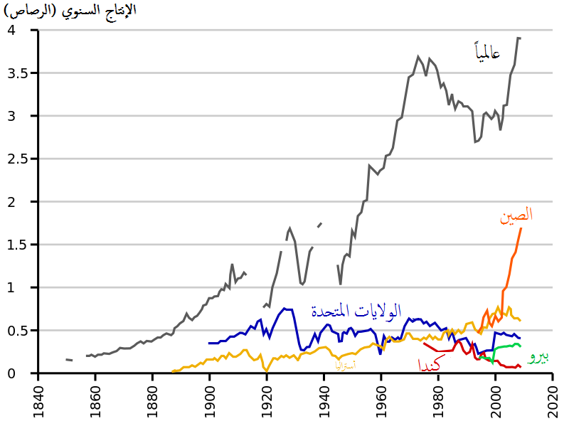 مخطط إنتاج الرصاص بالعربية